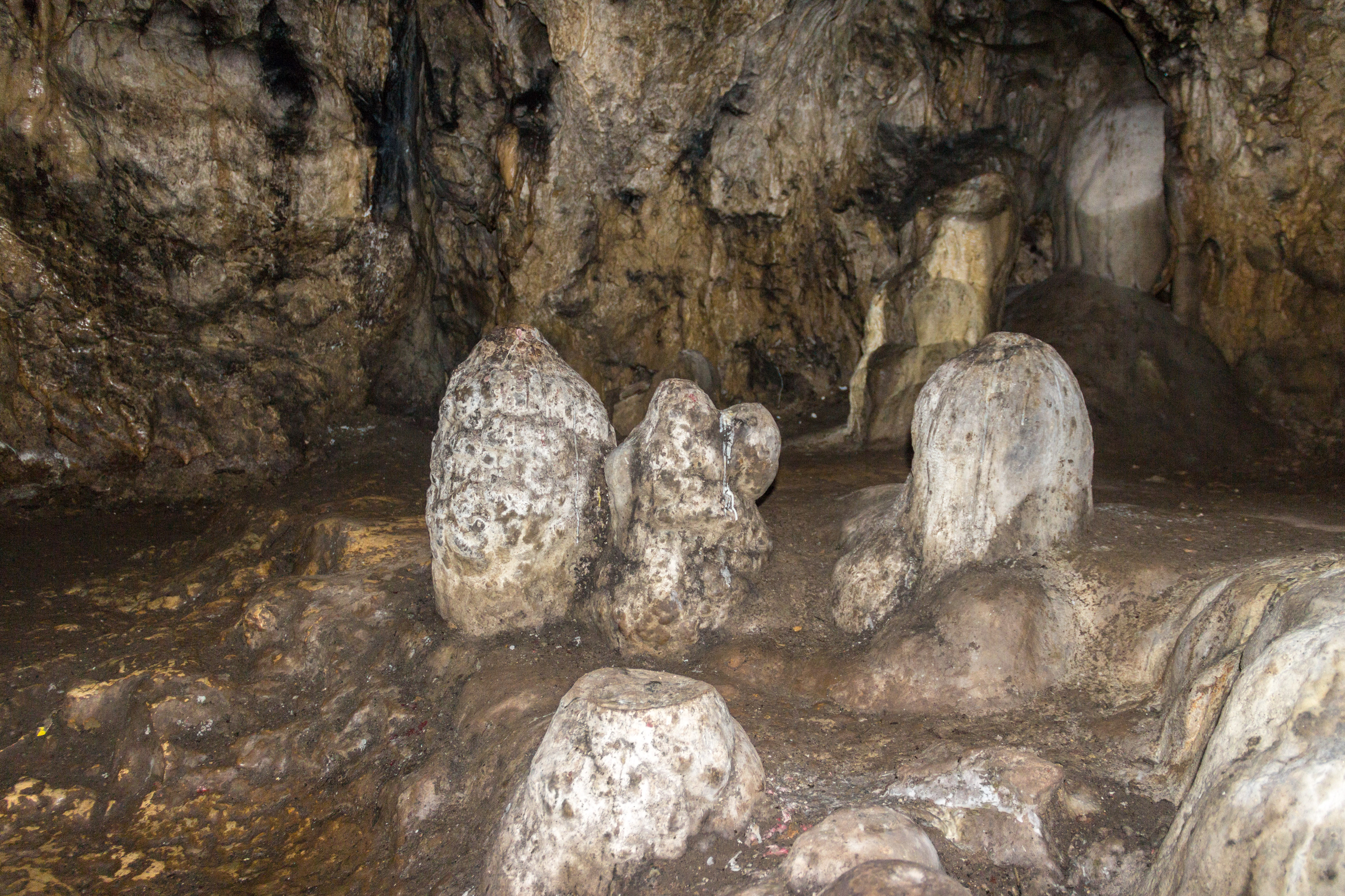 Rosenmüllerhöhle, Muggendorf, Vandalismus an Tropfsteinen